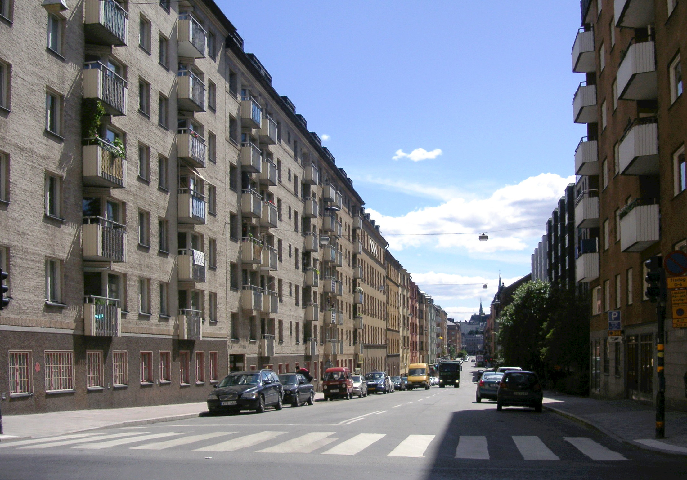 Tulegatan i Stockholm